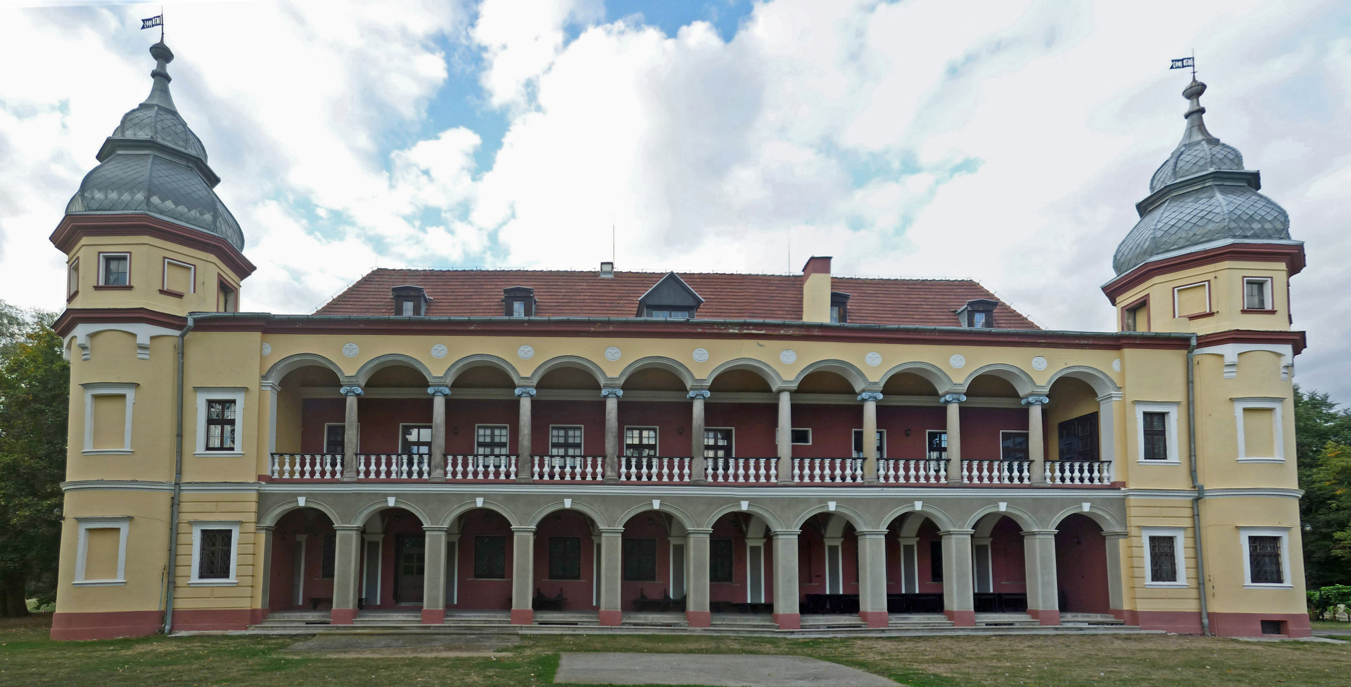 Krobielowice 21 - zamek, XVII, XIX